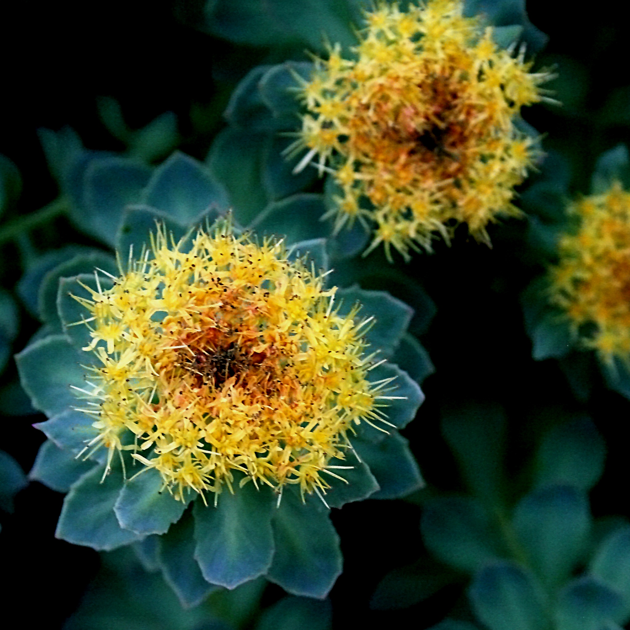 Ísland, Akureyri Botanical Gardens (Gartenecke 'Flora Islandica'): Rosenwurz_(Rhodiola_rosea)